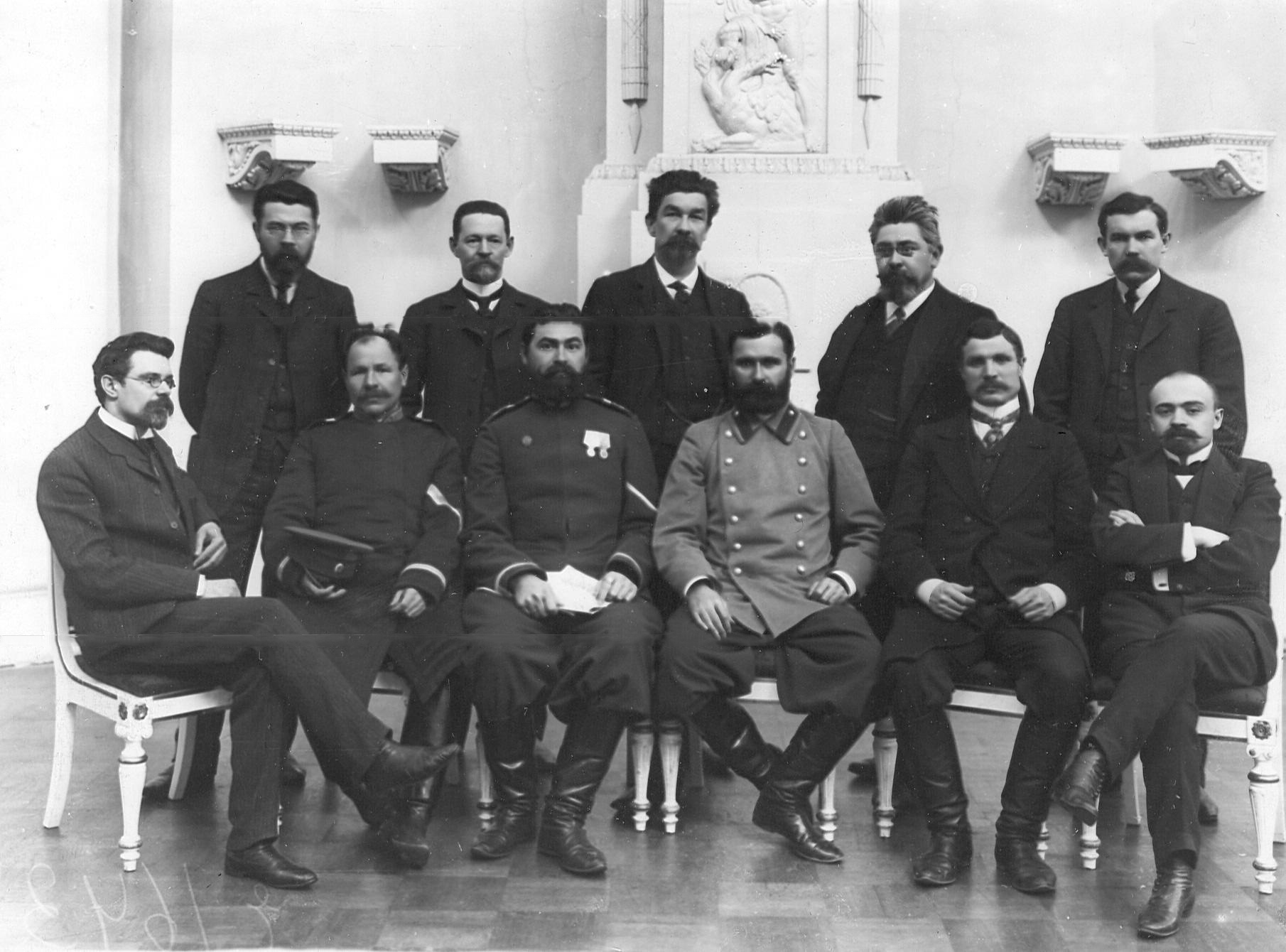 Депутаты Государственной думы Российской империи III созыва от Области войска Донского Стоят: Харламов, Василий Акимович Черницкий, Василий Иванович Пырков, Пётр Родионович Ефремов, Иван Николаевич Воронков, Митрофан Семёнович Сидят: Захарьев, Николай Александрович Петров, Арефий Корнеевич Кадацков, Иван Федосеевич Кравцов, Порфирий Фёдорович Плотников, Прокофий Абрамович Аджемов, Моисей Сергеевич